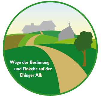 Logo des Besinnugsweges "Wege der Besinnung und Einkahr auf der Ehinger Alb"